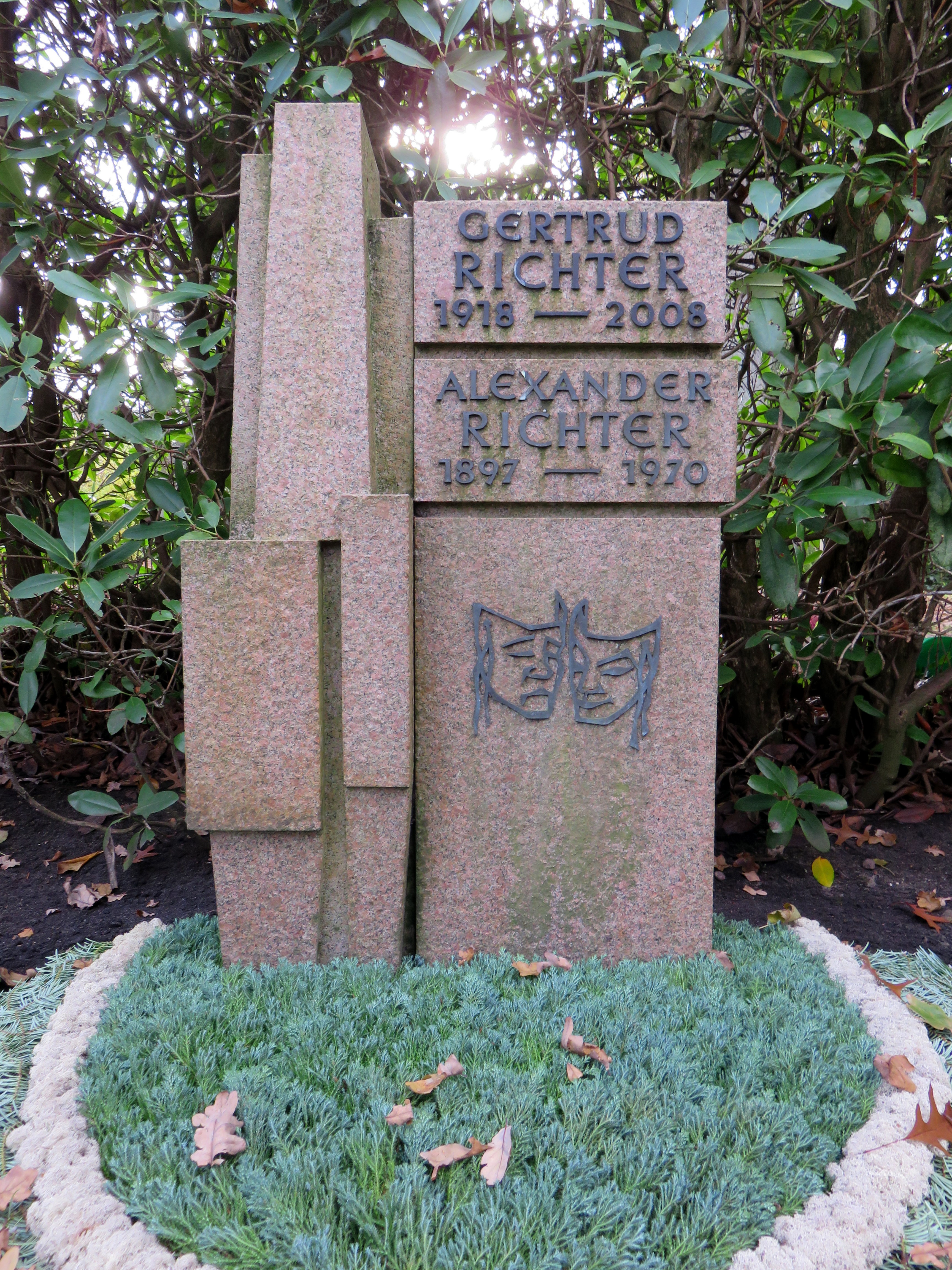 Grab des Direktors der Hamburger Volksoper, Alexander Richter, Sohn des österreichischen Theaterleiters Carl Richter, Friedhof Ohlsdorf, Planquadrat L15 (südlich Cordesallee).